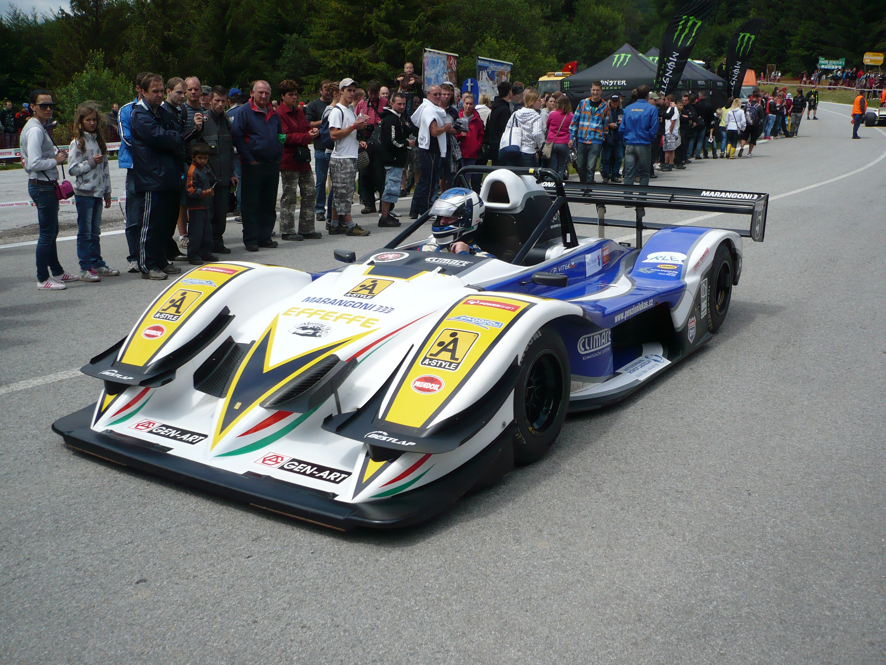 Osella PA30 Petra Viteka na ME PAV Dobšinský kopec 2012